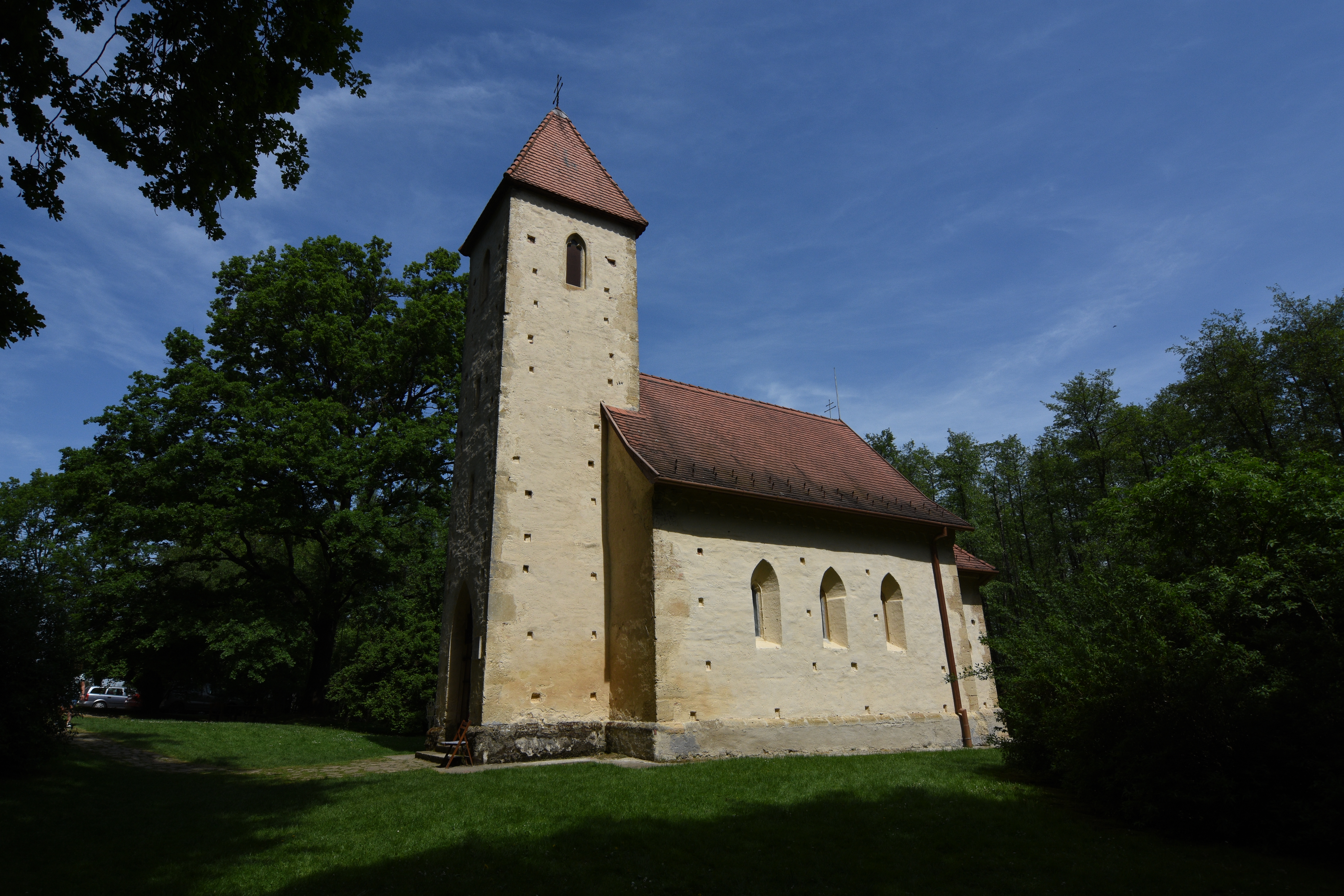 Holy Trinity and Saint Stephen of Hungary church in Velemér